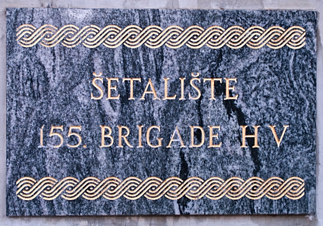 Šetalište 155. brigade HV u Crikvenici uz Dubračinu